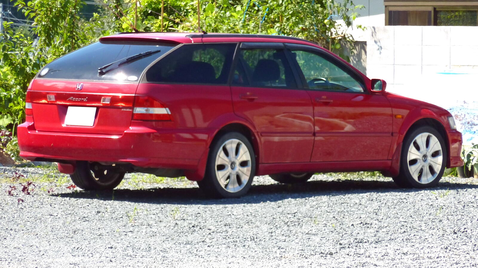 ホンダ・アコードワゴン（3代目・リア）